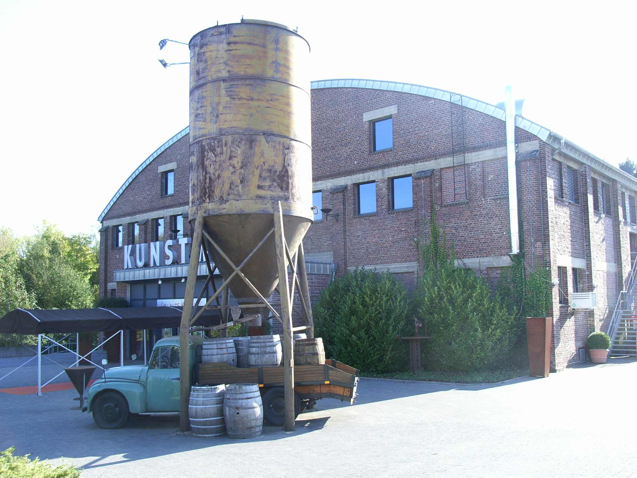 Veranstaltungsort KunstWerkstatt (Das Rote Krokodil) auf dem Gelände der ehem. Wickrather Lederfabrik